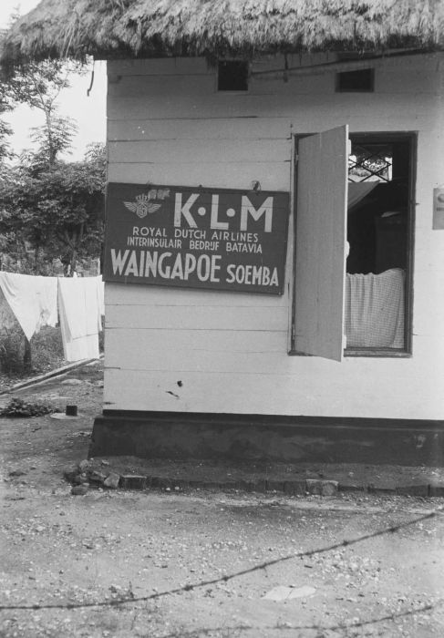 negatief. Kantoor van de KLM te Waingapu